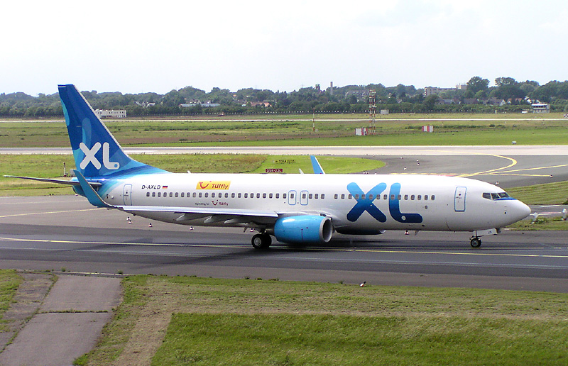 XL Airways Boeing 737-800 (D-AXLD) in Düsseldorf (EDDL)